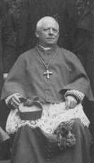 Jan Nepomuk Sedlák (1854 - 1930), Český římskokatolický kněz.